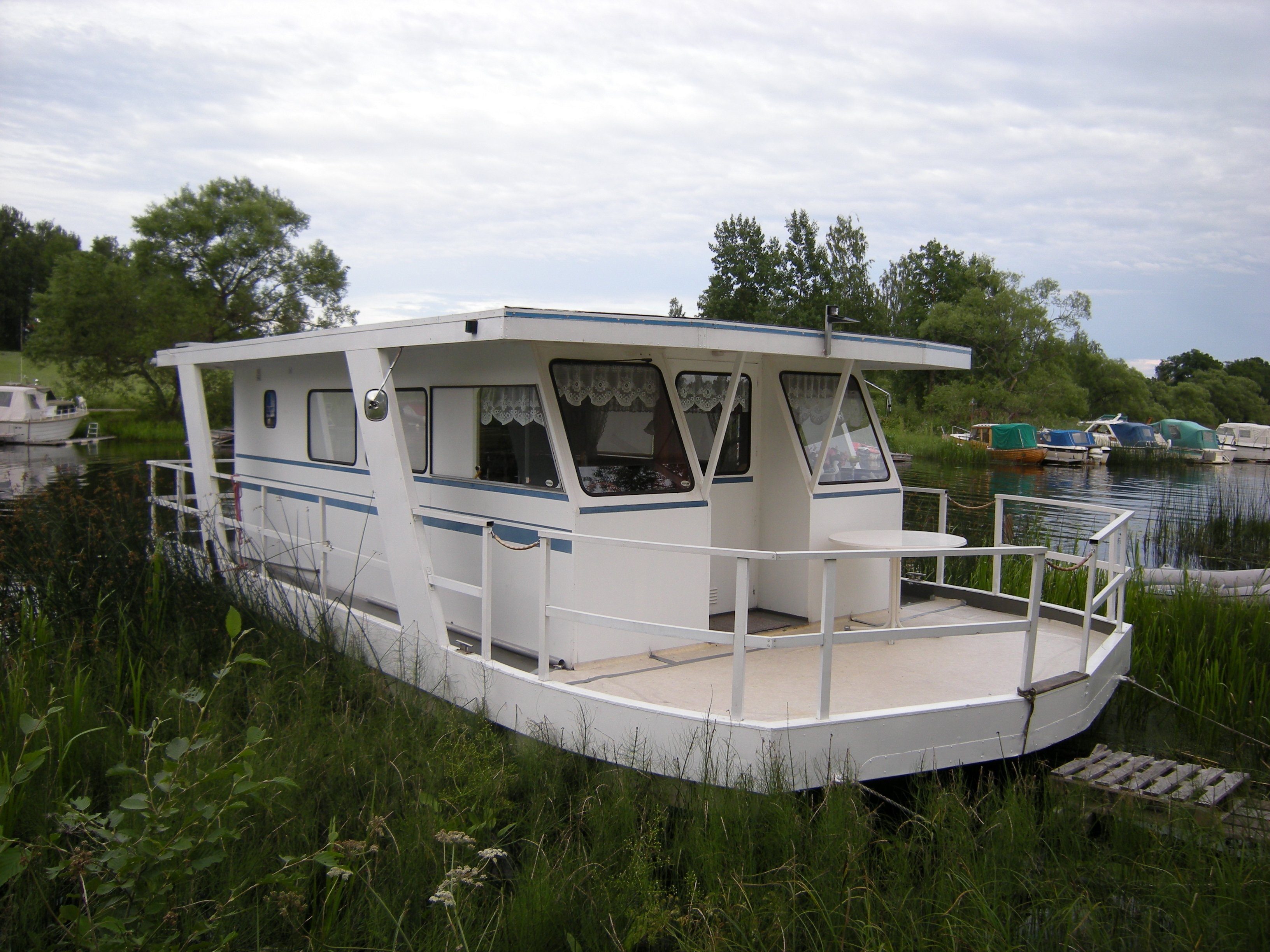 Husbåt i Ornäs.